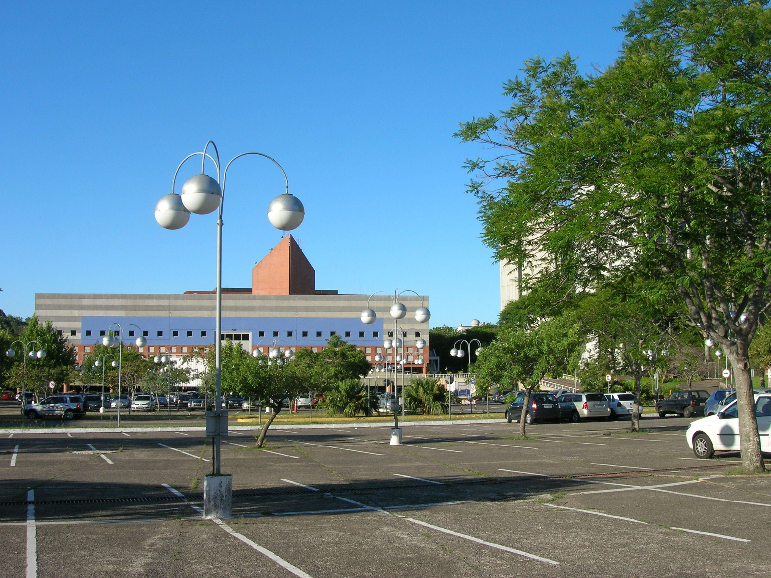 Estacionamentos descoberto e coberto da PUCRS, com o centro de eventos ao fundo.